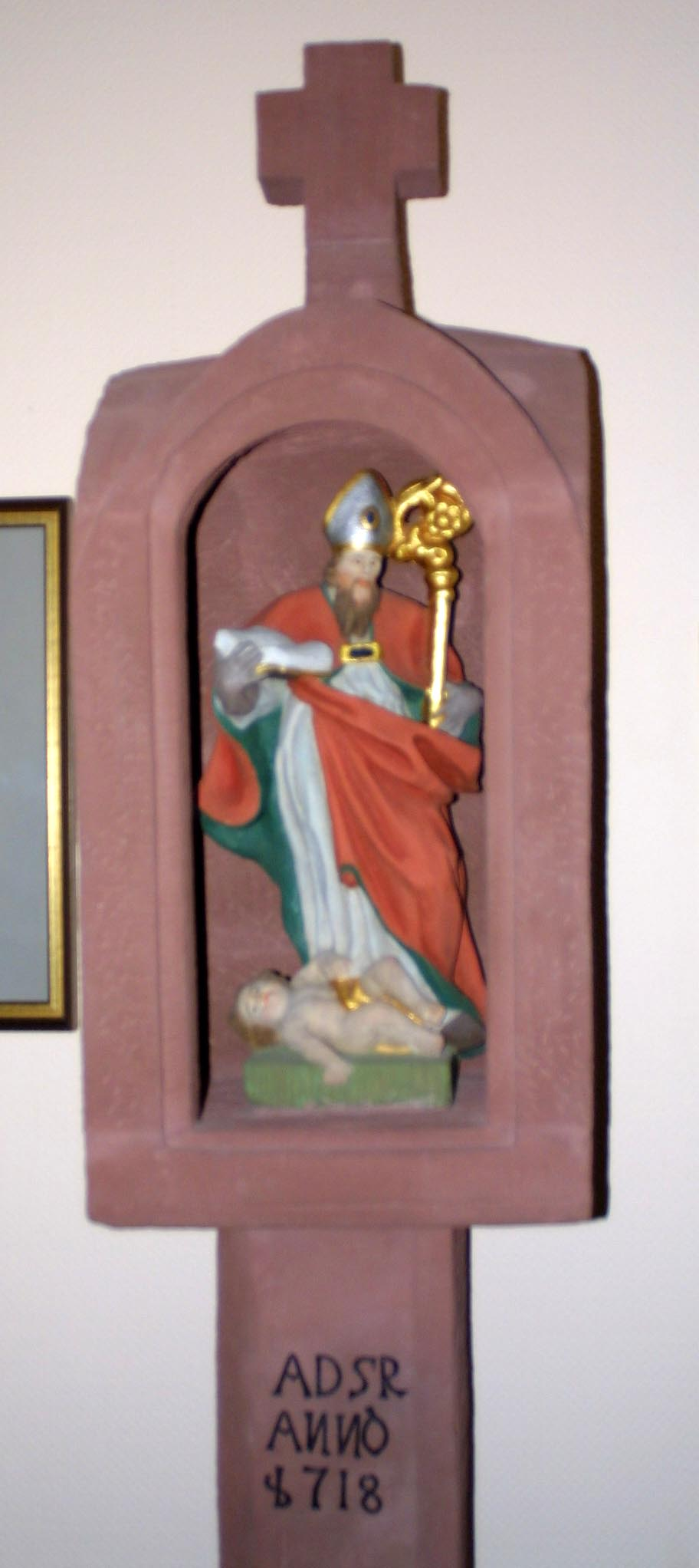 Bildstock von Nikolaus Hoof in Mudau (Totenleuchte)